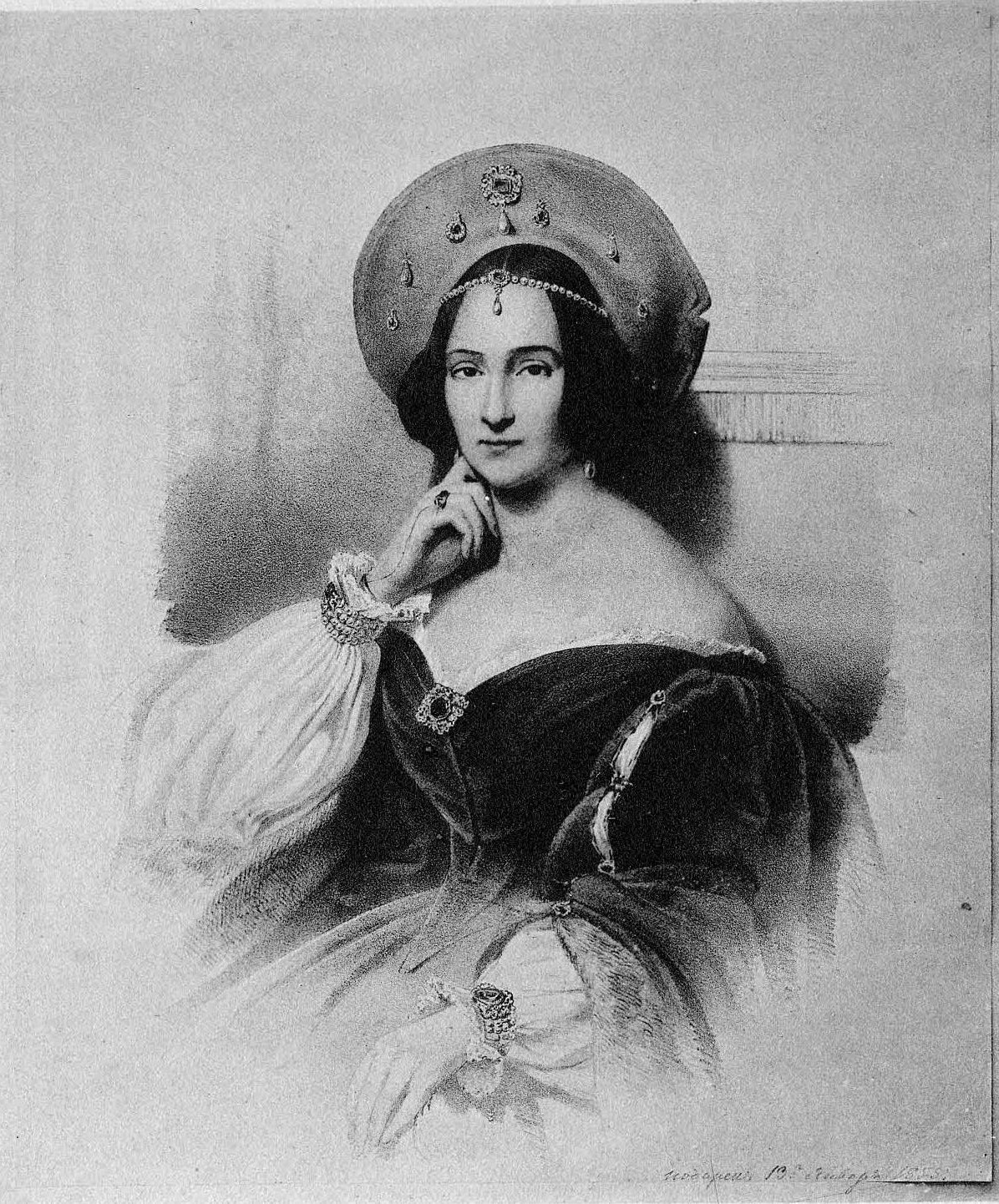 Софья Петровна Голицына, ур. Балк-Полева (1806-1888), одна из четырёх дочерей посла в Бразилии Пётра Фёдоровича Балк-Полевого (1777-1849) и Варвары Николаевны Салтыковой (1781-1841); с 1824 года жена витебского, могилевского и смоленского ген.-губернатора князя А.М.Голицына (1792-1863), во втором браке за Гейнингер д’Эрисвиль и Гудисвиль.